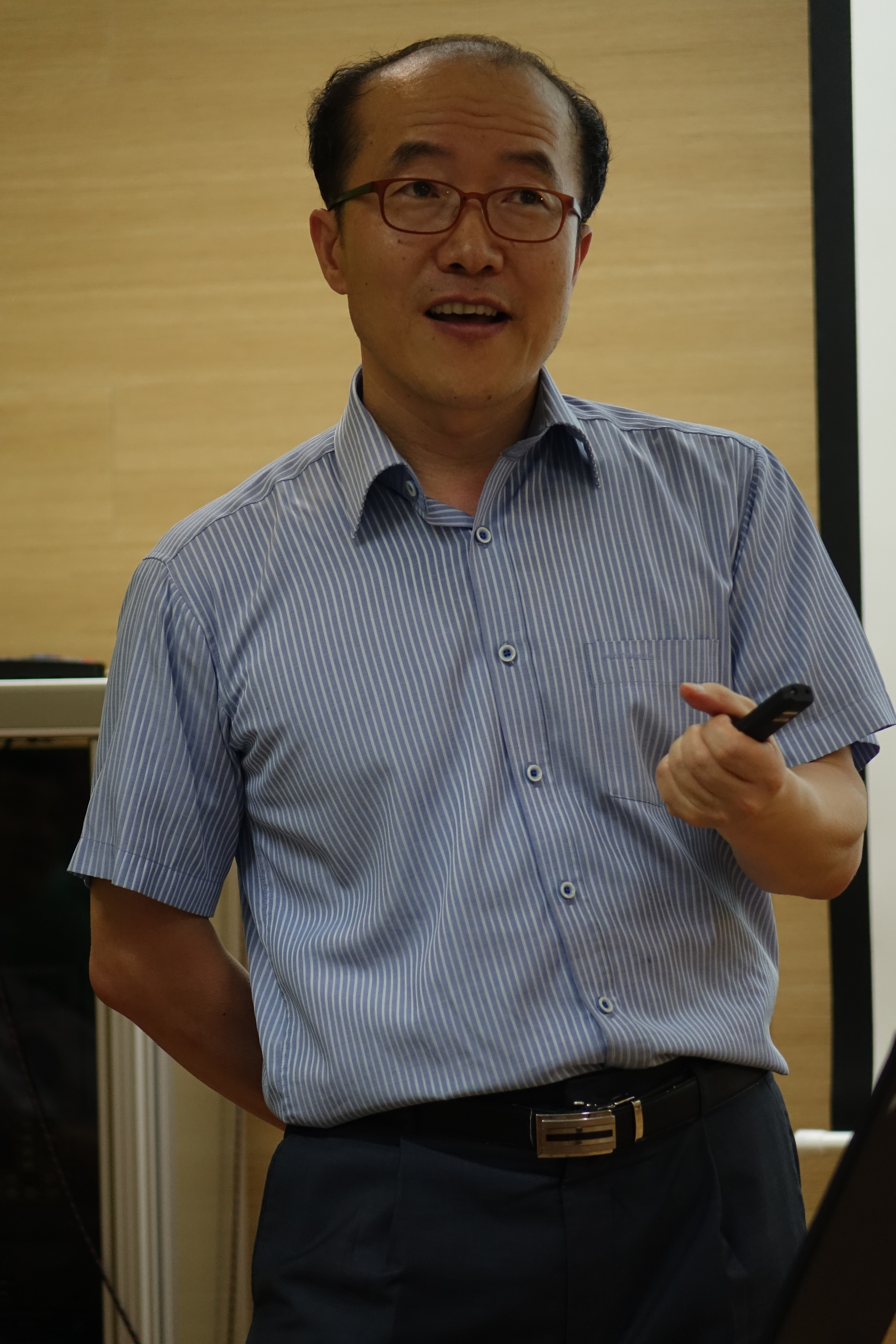 충남대학교 자치행정학과 교수 김찬동